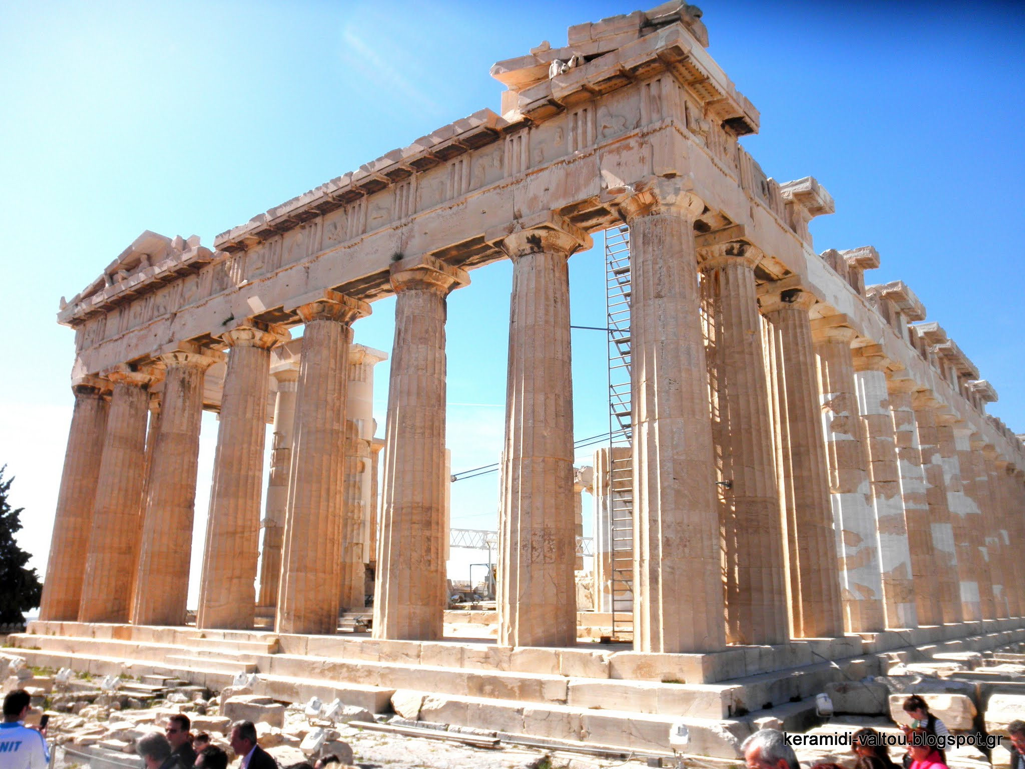 Parthenon